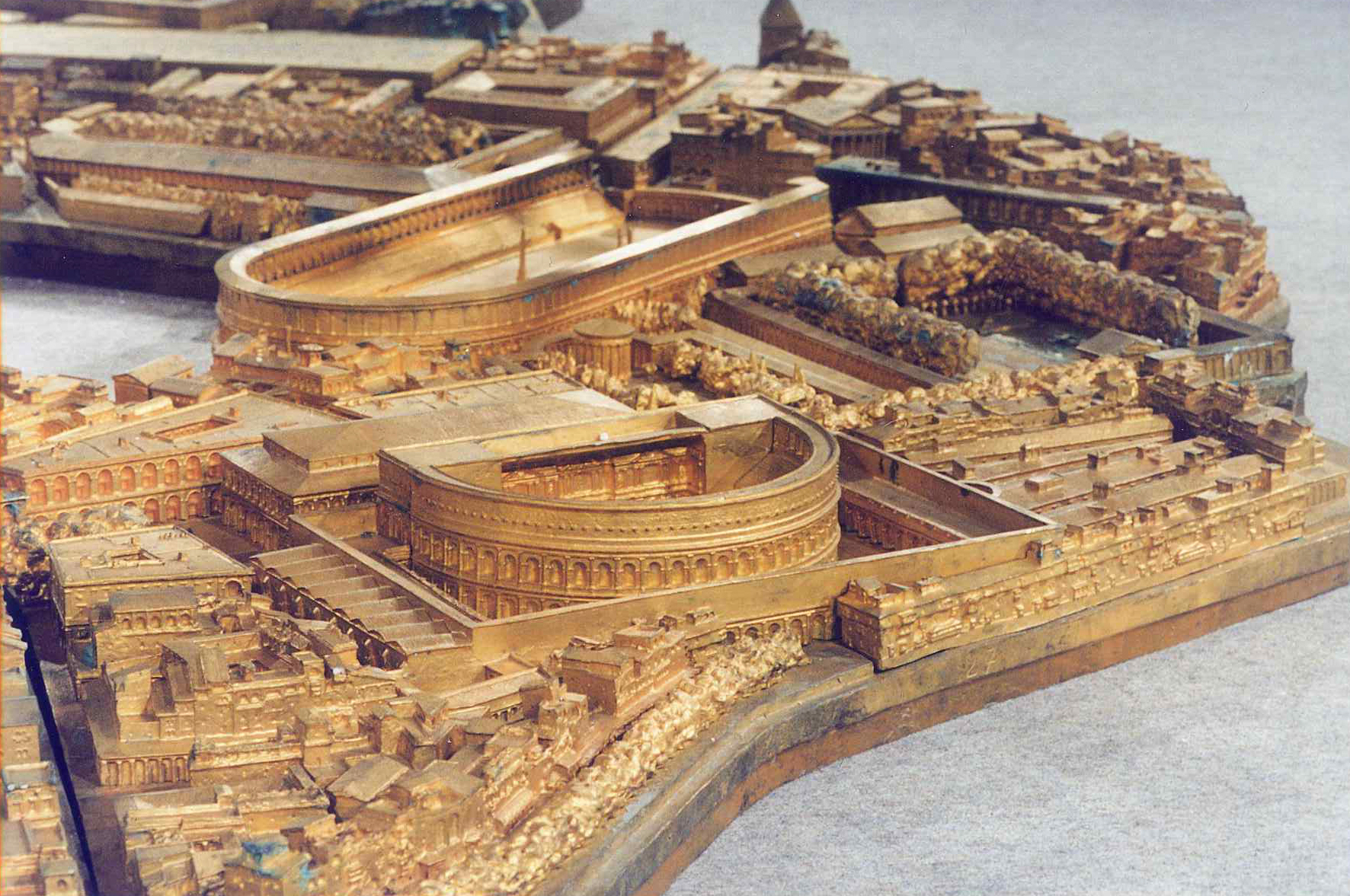 Plan de Rome de Bigot éléments en bronze - Université de Caen CIREVE